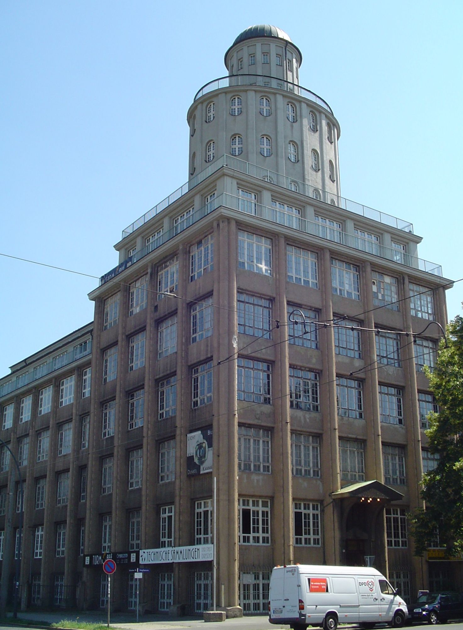 Gebäude der Technischen Sammlungen Dresden, Symbolgeber der Firma Pentacon